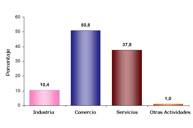 cuadro economio de valledupar